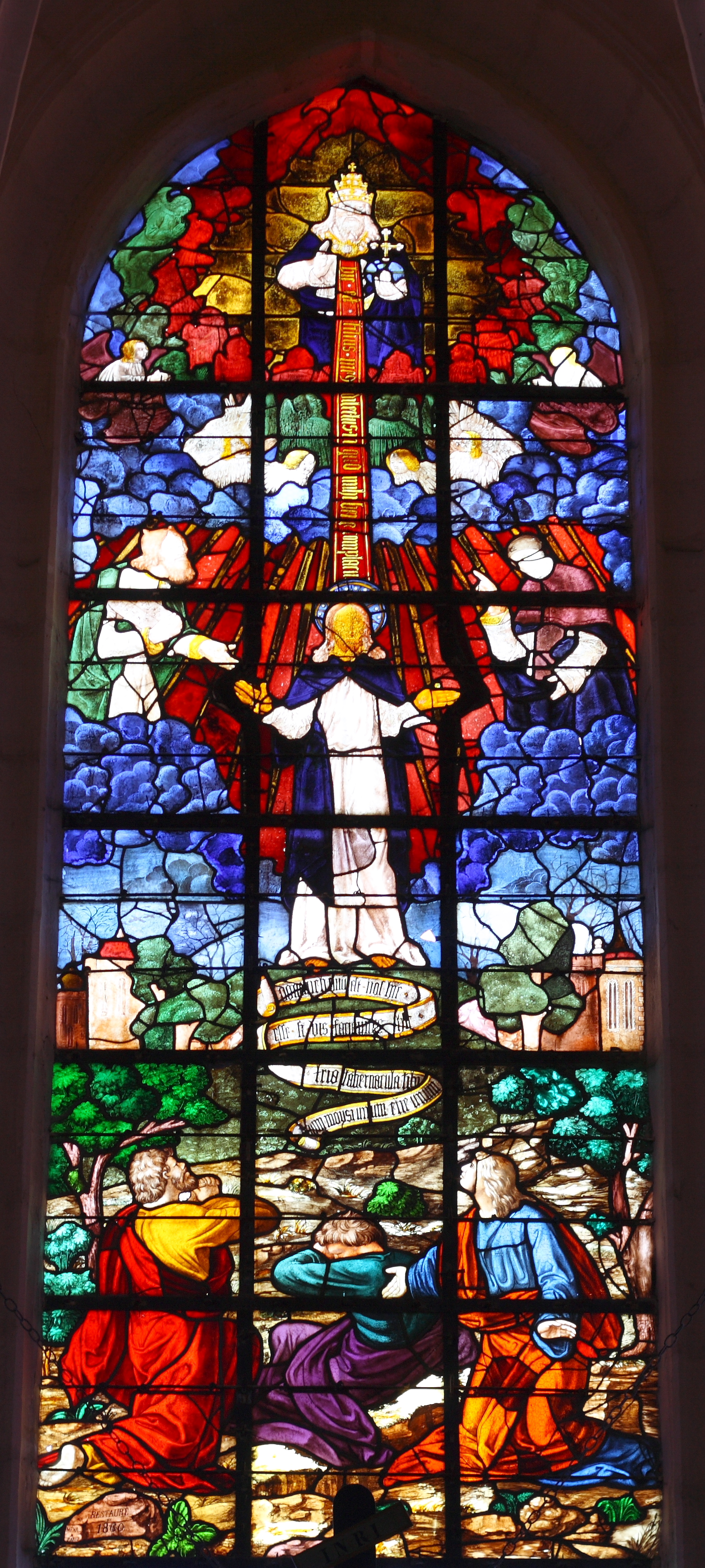 Bleiglasfenster aus dem 16. Jahrhundert in der katholischen Kirche Saint-Martin in Survilliers, einer Gemeinde im Canton de Luzarches (Île de France), Darstellung: Transfiguration